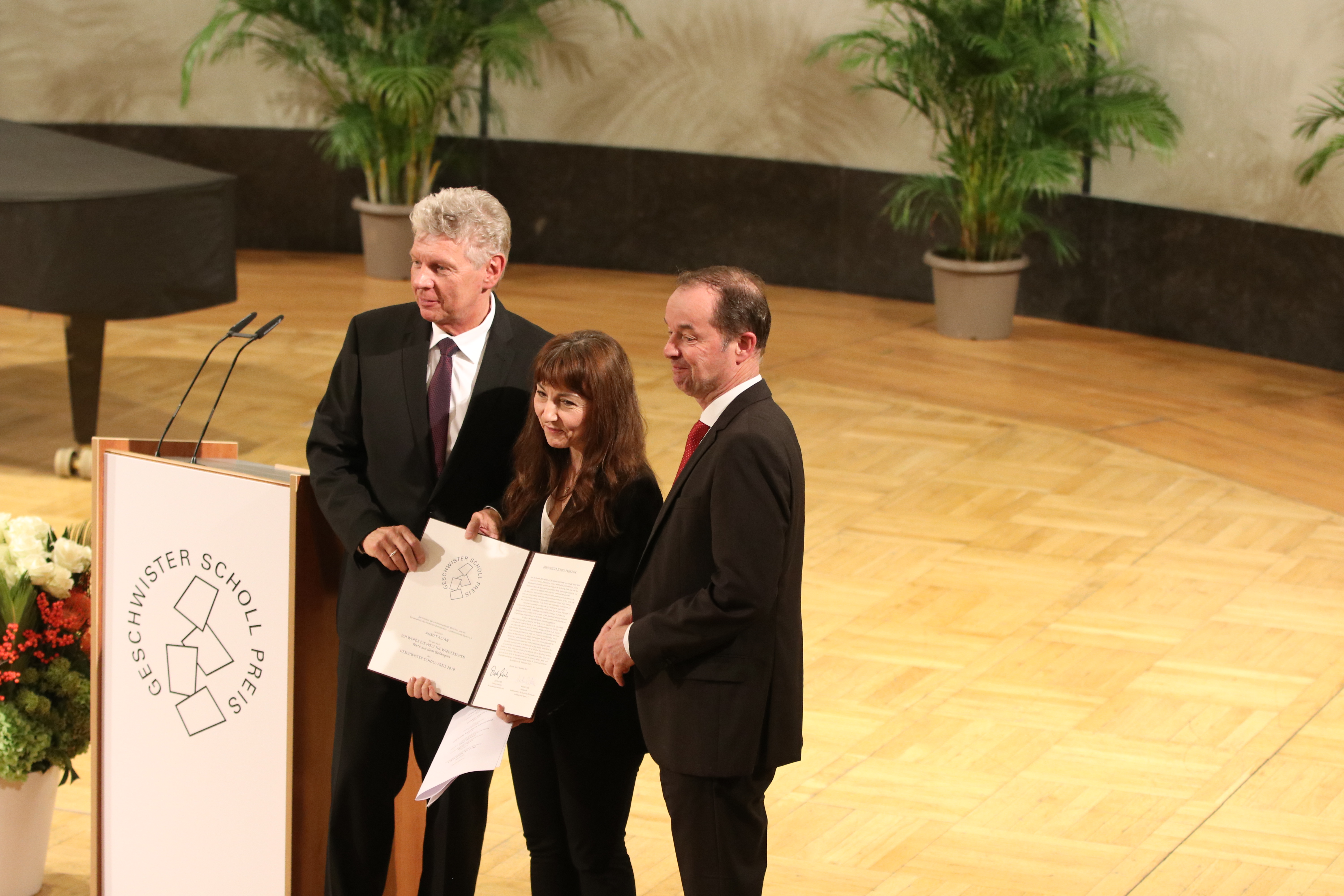 Verleihung des Geschwister-Scholl-Preises 2019 an Ahmet Altan, der nicht anwesend sein kann, da er in der Türkei in Haft genommen wurde. (v. links:) Münchner Oberbürgermeister Dieter Reiter, Journalisten und Schriftstellerin Yasemin Çongar (die den Preis für Ahmet Altan in Empfang nimmt), Michael Then, Vorsitzender des Börsenvereins des deutschen Buchhandels, Landesverband Bayern e. V.